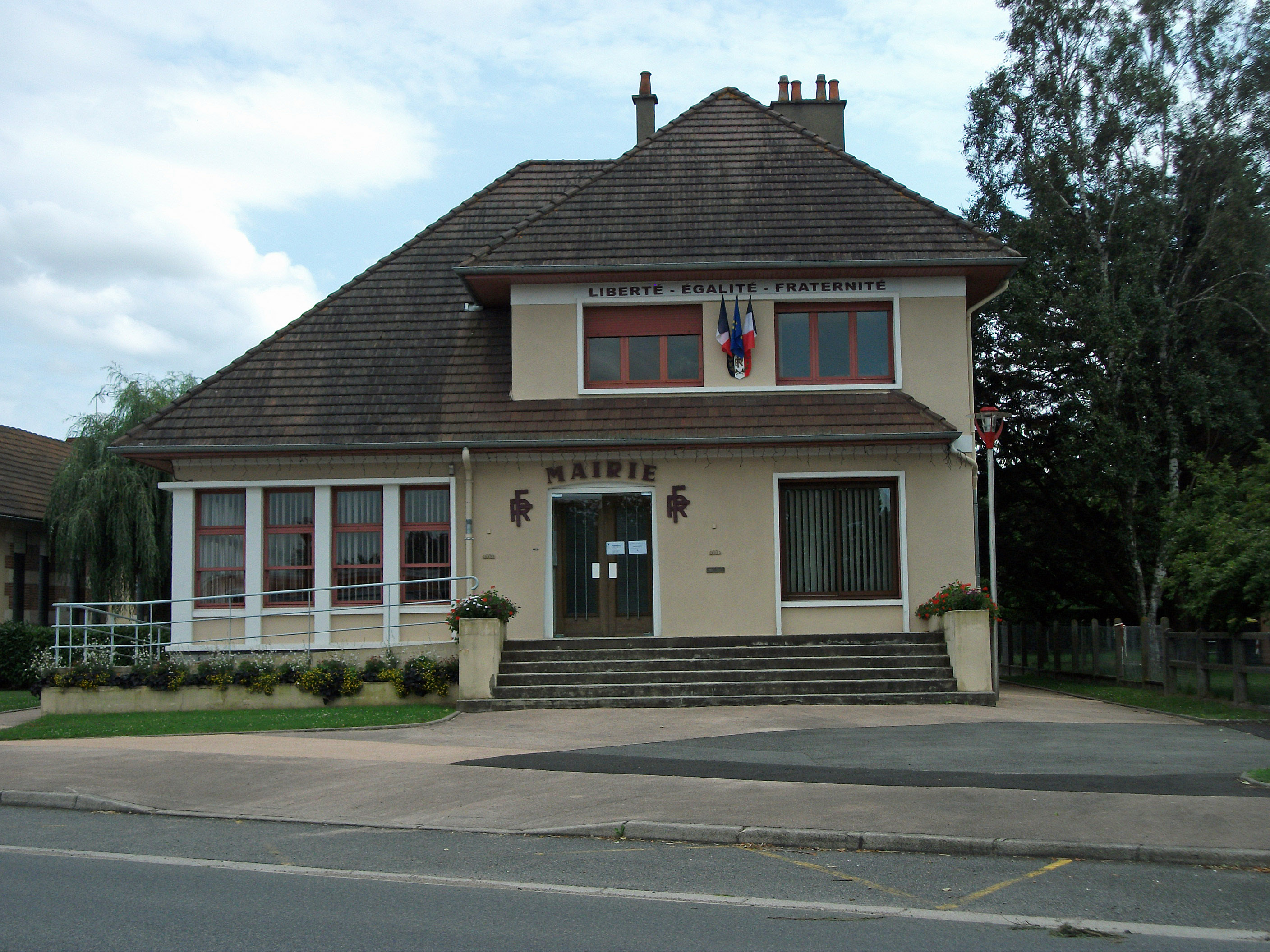 Mairie de Vendat